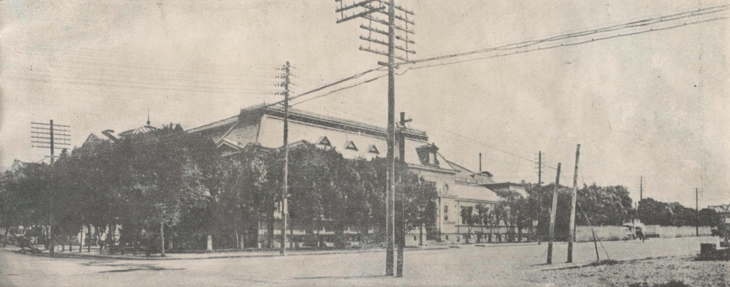 中文（台灣）: 1904年竣工之第一代臺灣銀行